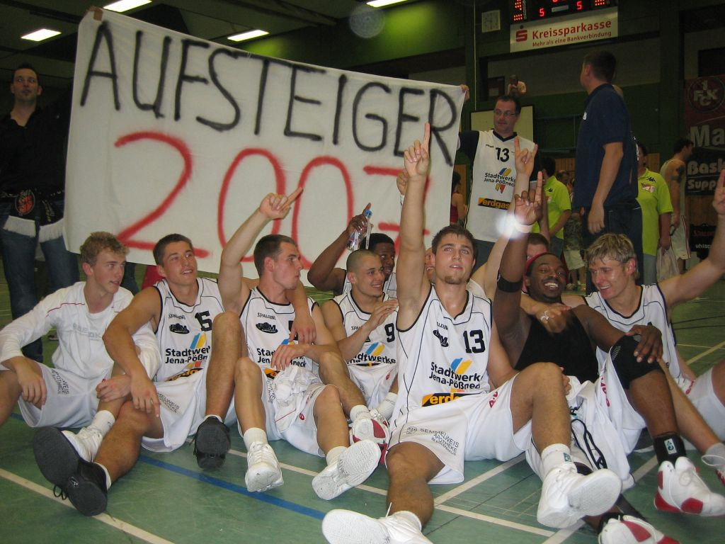 Aufstiegsfeier der POM baskets Jena am Ende der Saison 2006/07. Aufgenommen nach dem Spiel gegen den 1. FC Kaiserslautern.